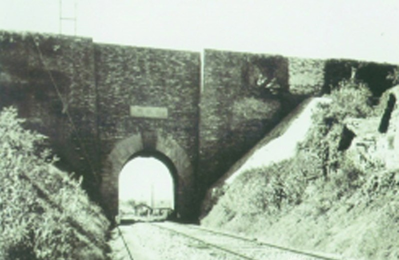 位于南京的雨花门，此为1950年代拆除之前的原城门